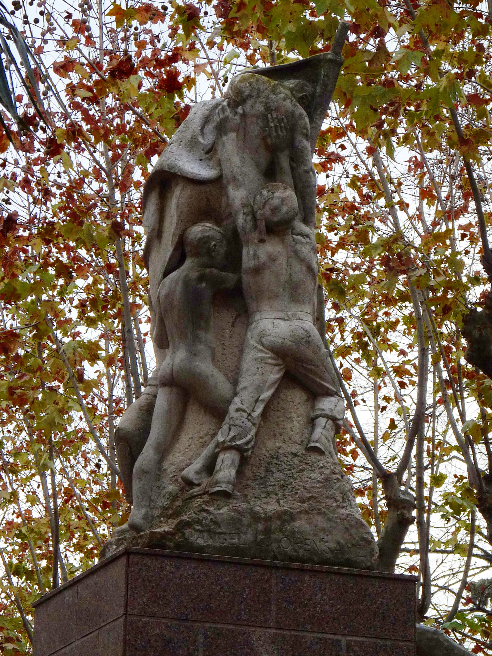 Huesca - Parque Miguel Servet - A los oscenses muertos - realizado por Angel Orensanz en 1963